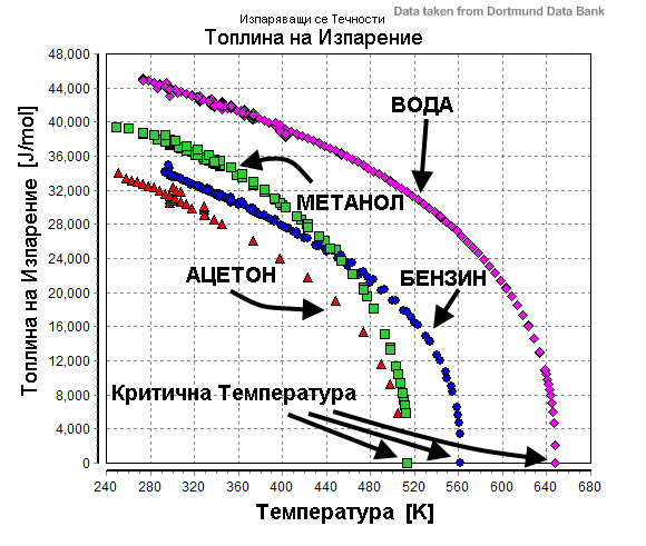 Специфична топлина на изпарение